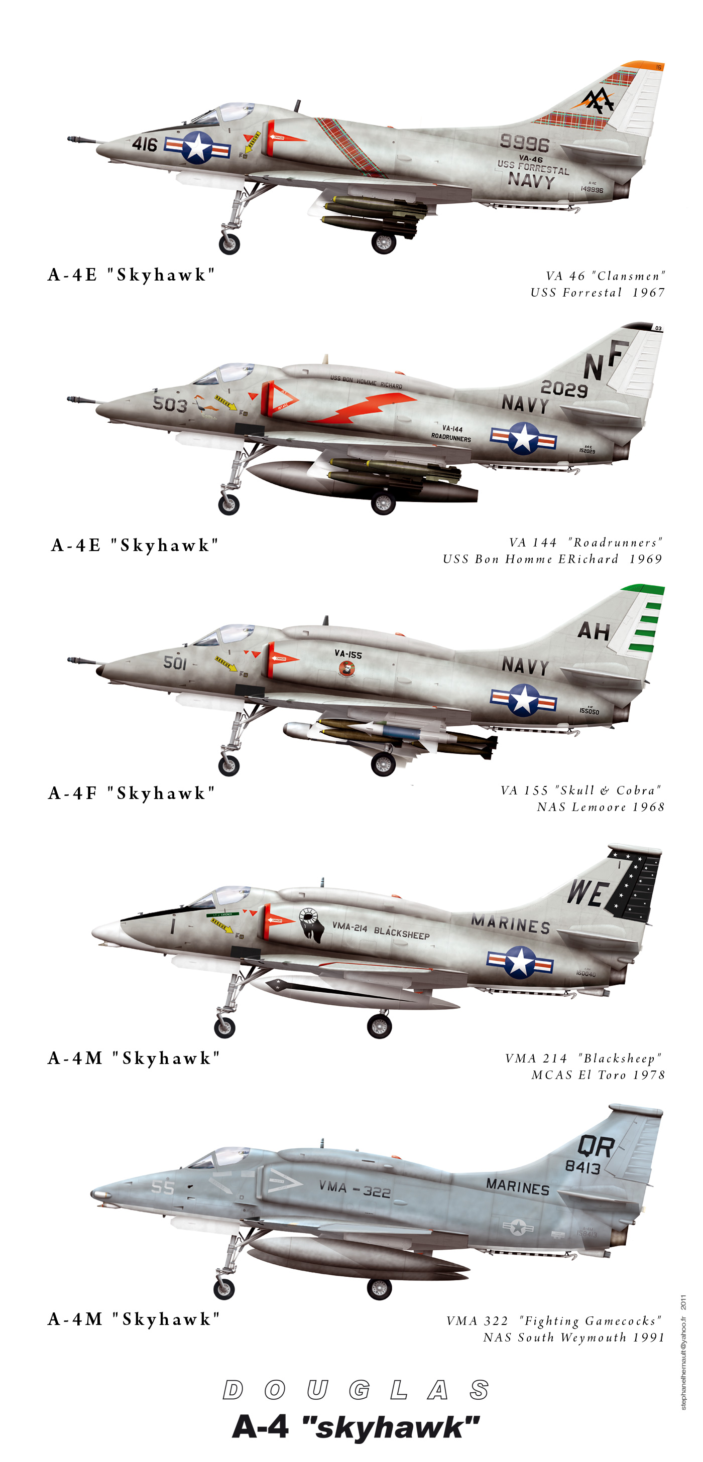 A-4 skyhawk version E/F/M